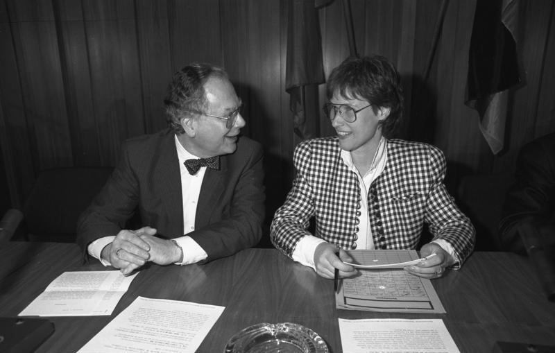 27.1.1988 Ministerialdirektor Barthold C. Witte (Abteilungsleiter im Auswärtigen Amt) erhält aus der Hand des Stiftungspräsidenten der "Fondation du Mérite Européen", Francois Visine, für sein langjähriges Europa-Engagement den "Mérite Européen" in Silber- im Haus des DIHT